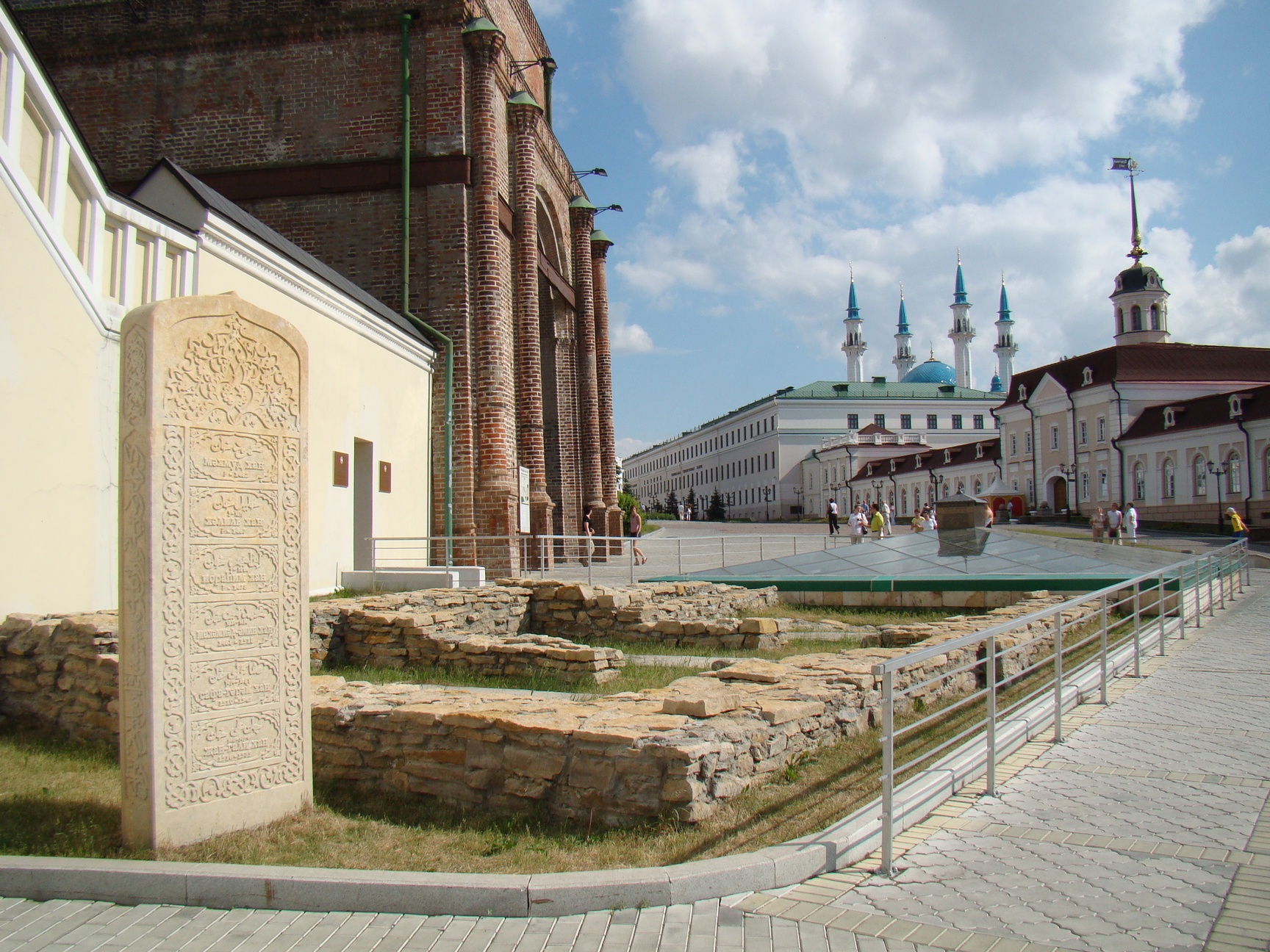 Захоронения ханов Казанского ханства в Казанском кремле